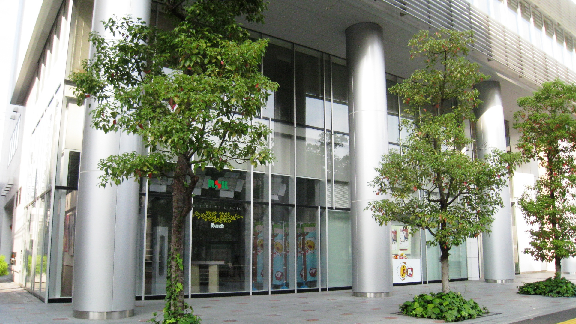 香川県高松市古新町にあるRSK山陽放送四国支社のオープンスタジオ。愛称はRSKおりーぶスタジオ。